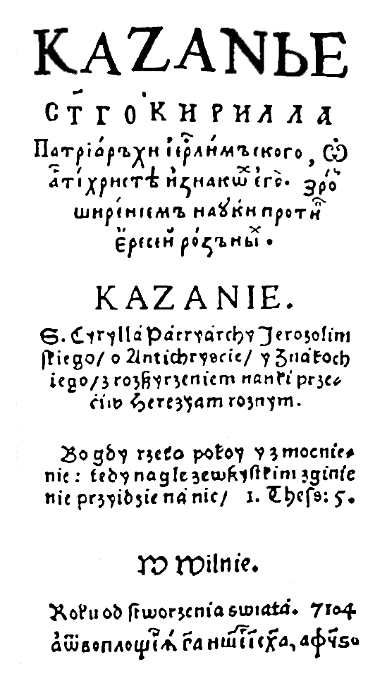 Kazanie of Cyrill